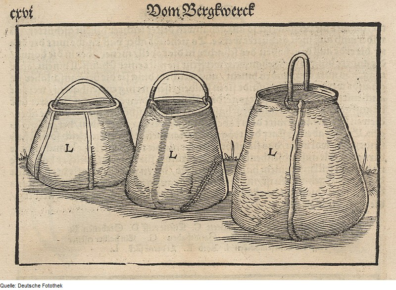 Original image description from the Deutsche Fotothek Bergwerk & Bergbau & Ledersack